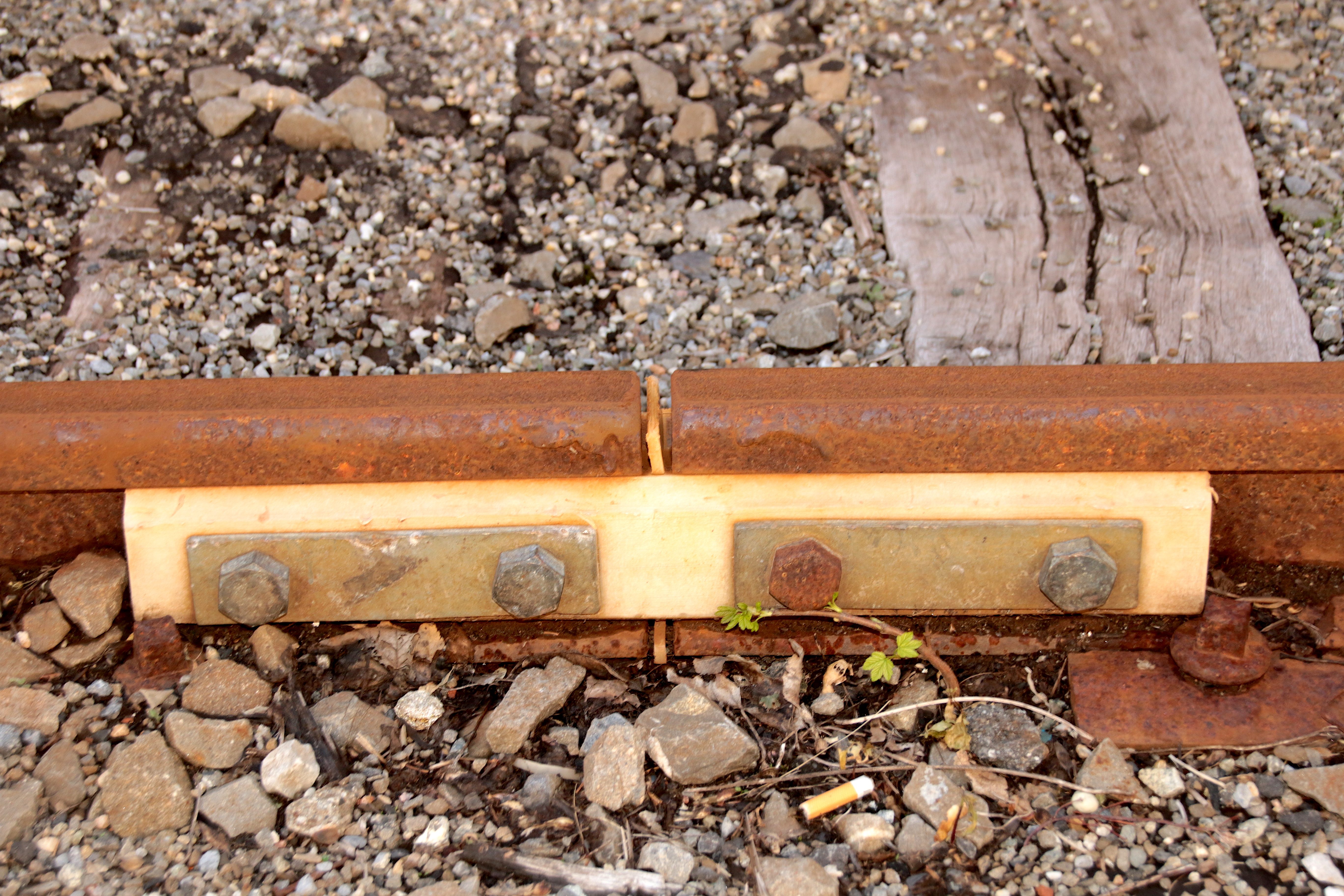 Isolierter Stoss der Matterhorn-Gotthard-Bahn im Bahnhof Göschenen (2019)